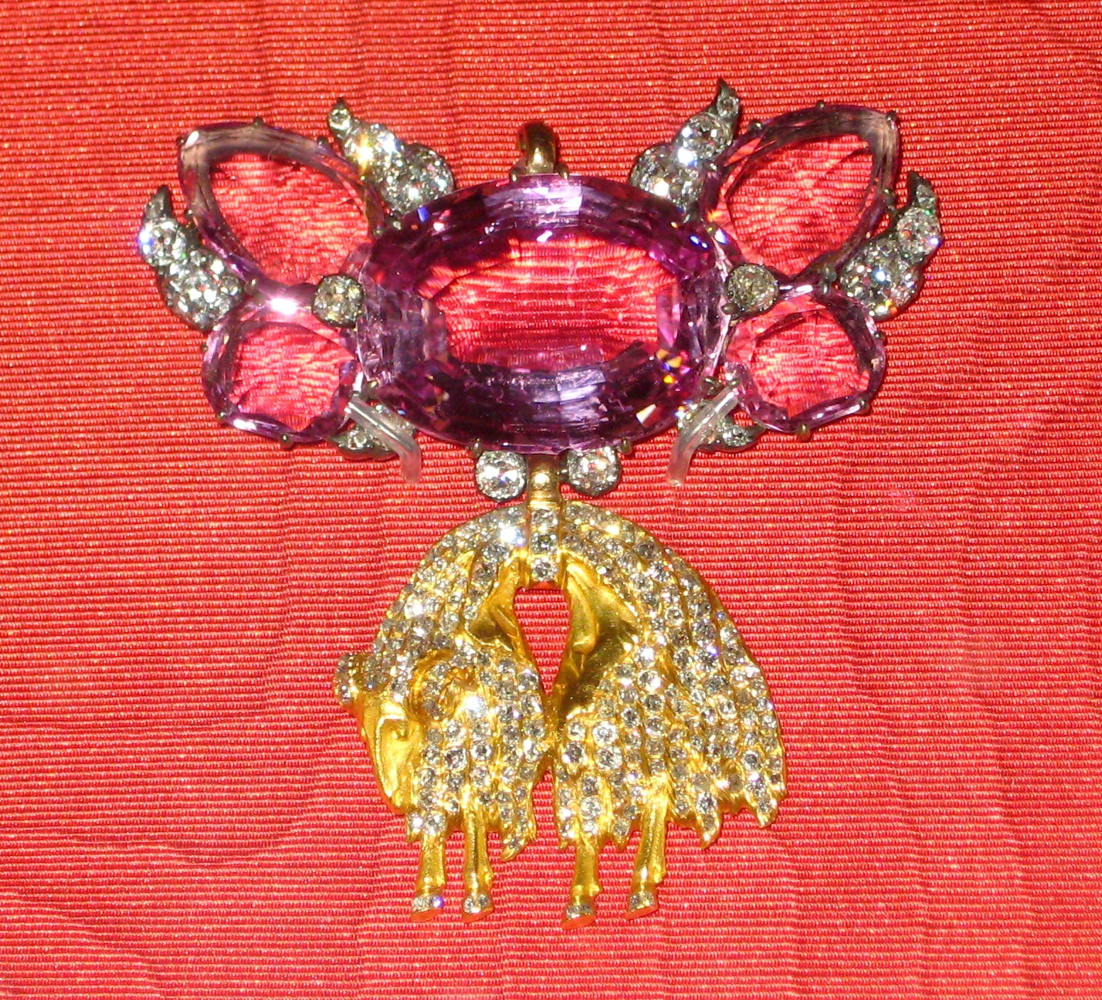 Орден Золотого руна с топазами. Принадлежал Александру I (?). Алмазный фонд